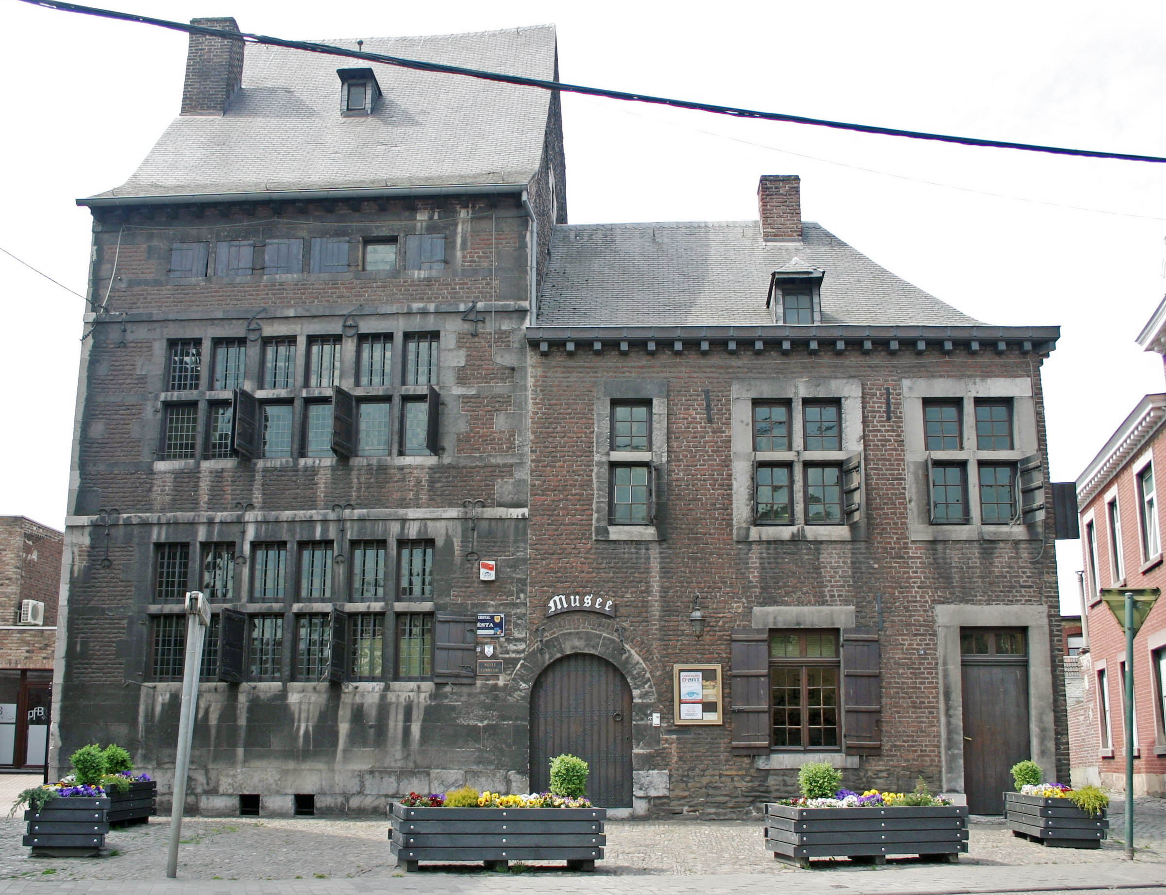 Sujet:Herstal De Musée